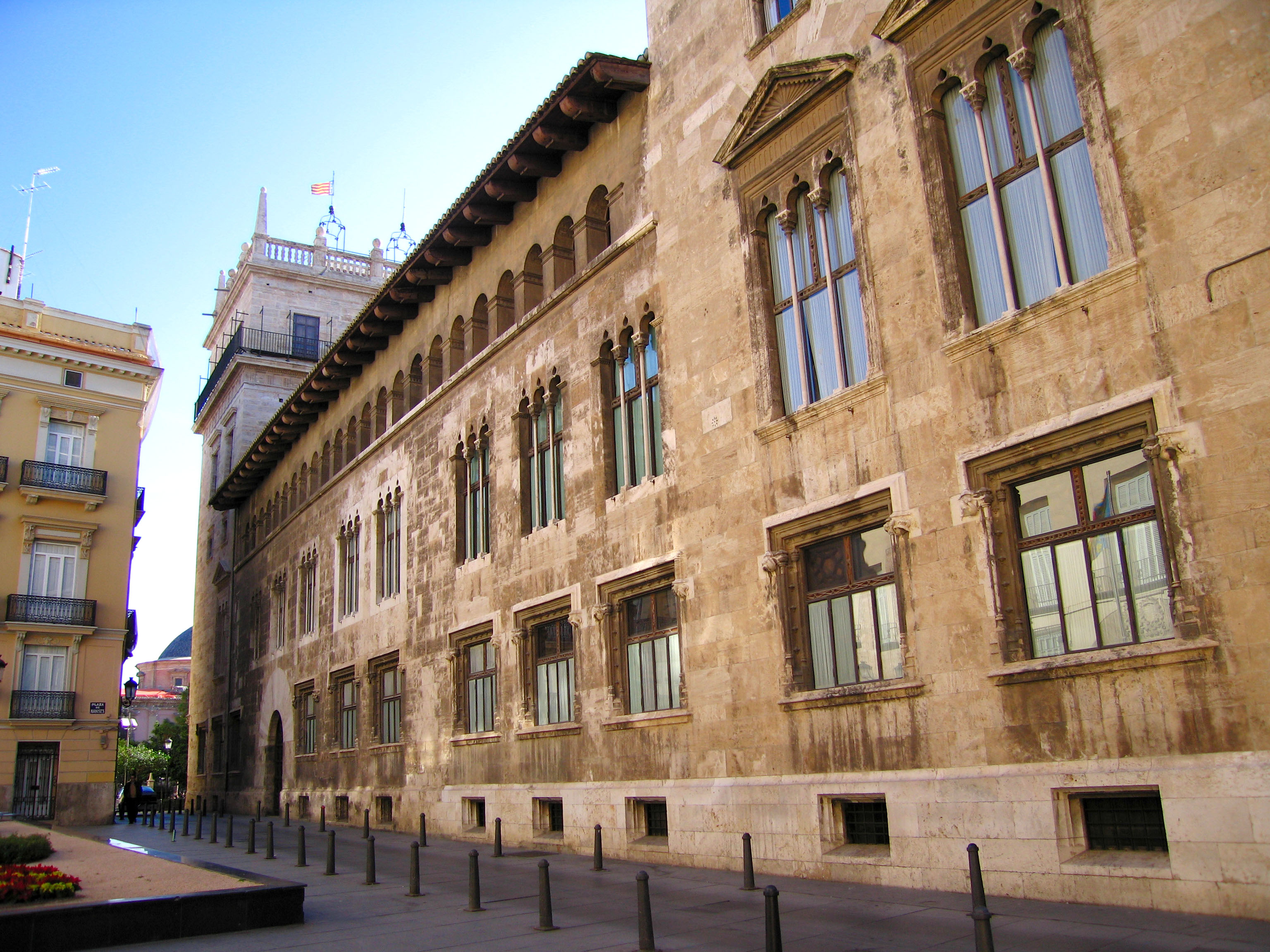 Palau de la Generalitat de València